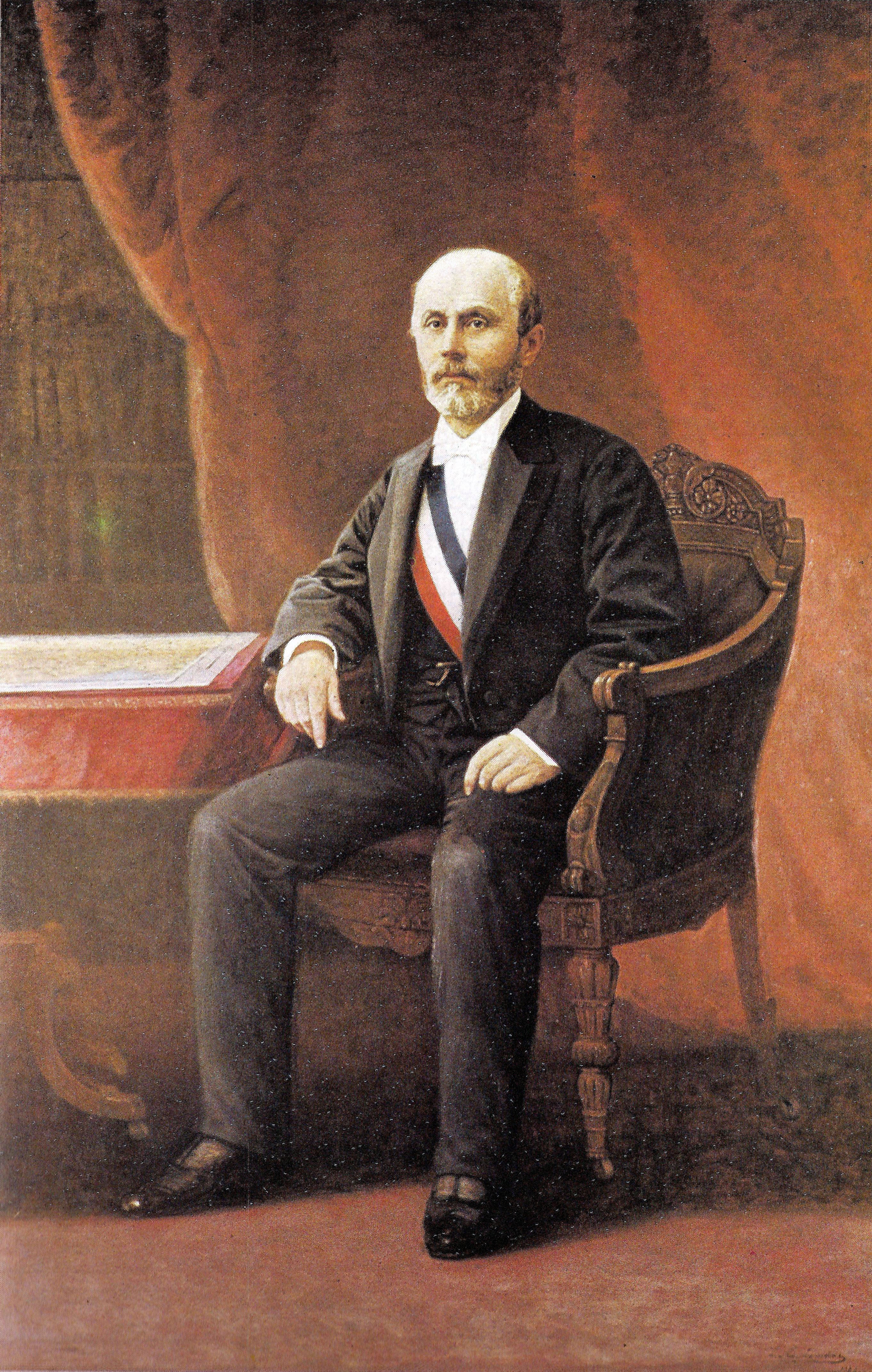 Aníbal Pinto Garmendia1 (Santiago, 15 de marzo de 1825 - Valparaíso, 9 de junio de 1884)2 Abogado, político y Presidente de Chile. Fue director y superintendente del Cuerpo de Bomberos de Santiago.